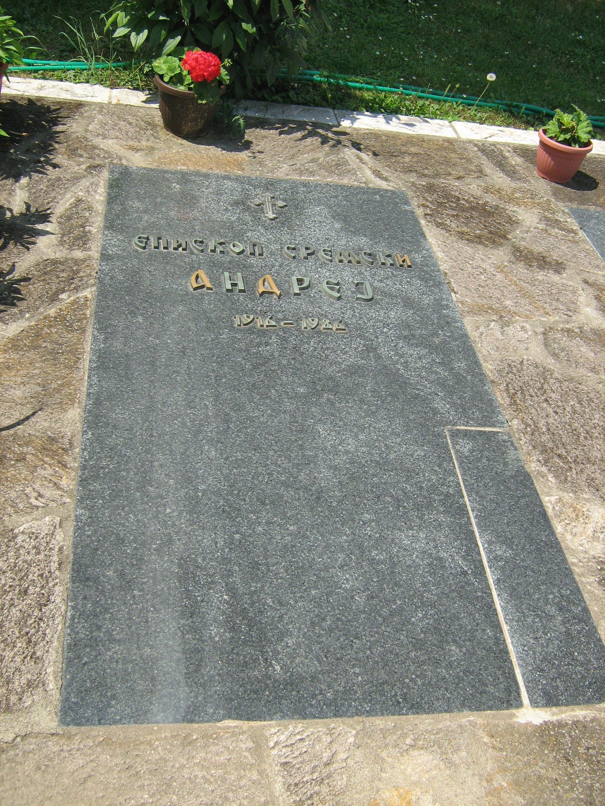 Епископ сремски Андреј - гроб испред цркве